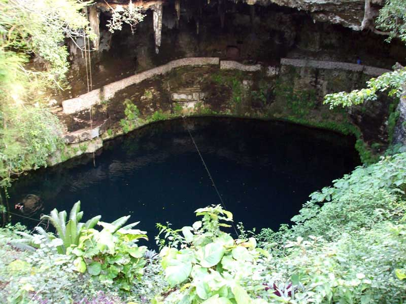 Cenote Zací, Valladolid México